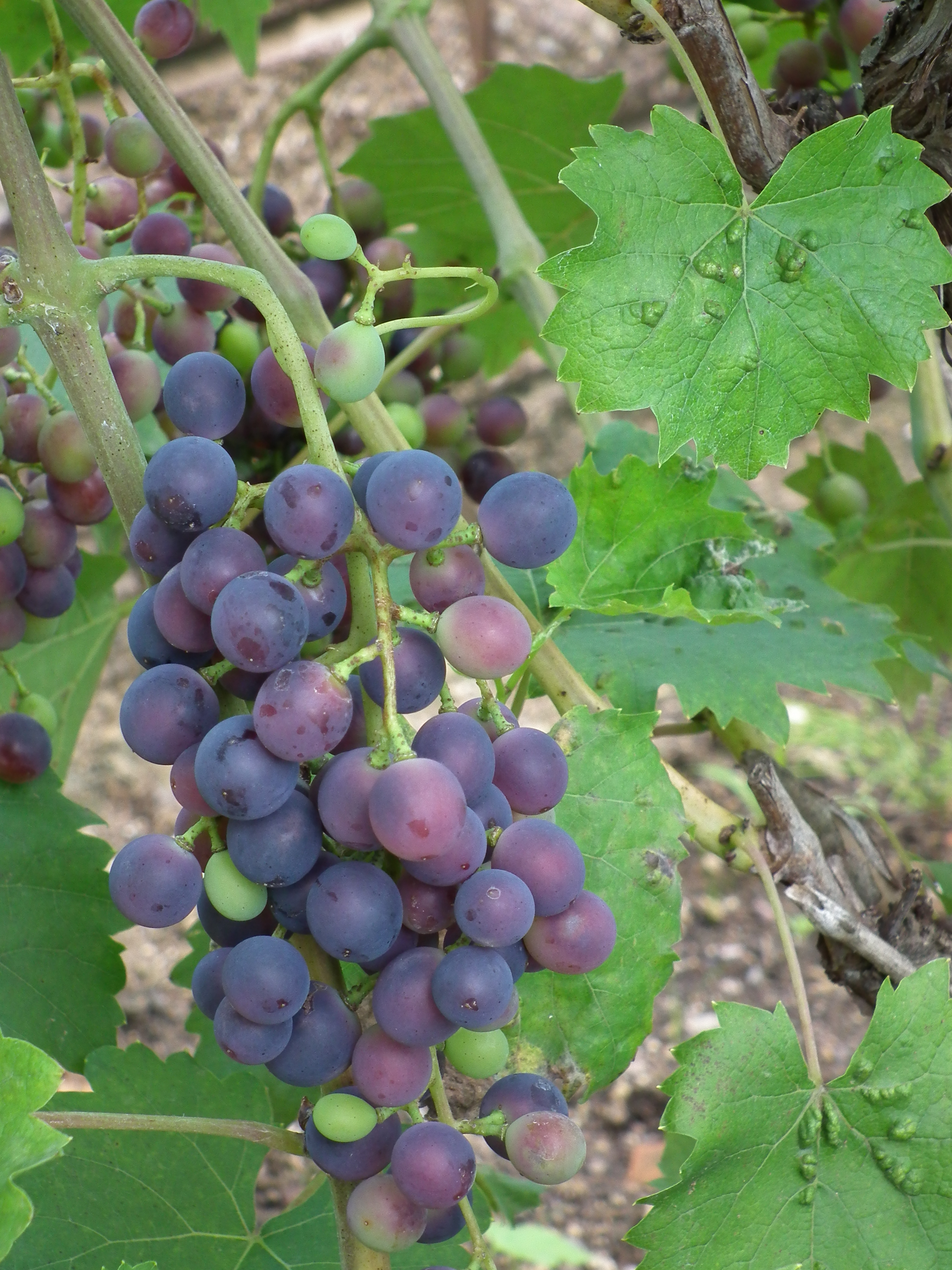 Kultur-Weinstock Muscat bleu (Vitis vinifera), fotografiert in Heidelberg (Baden-Württemberg, Deutschland)